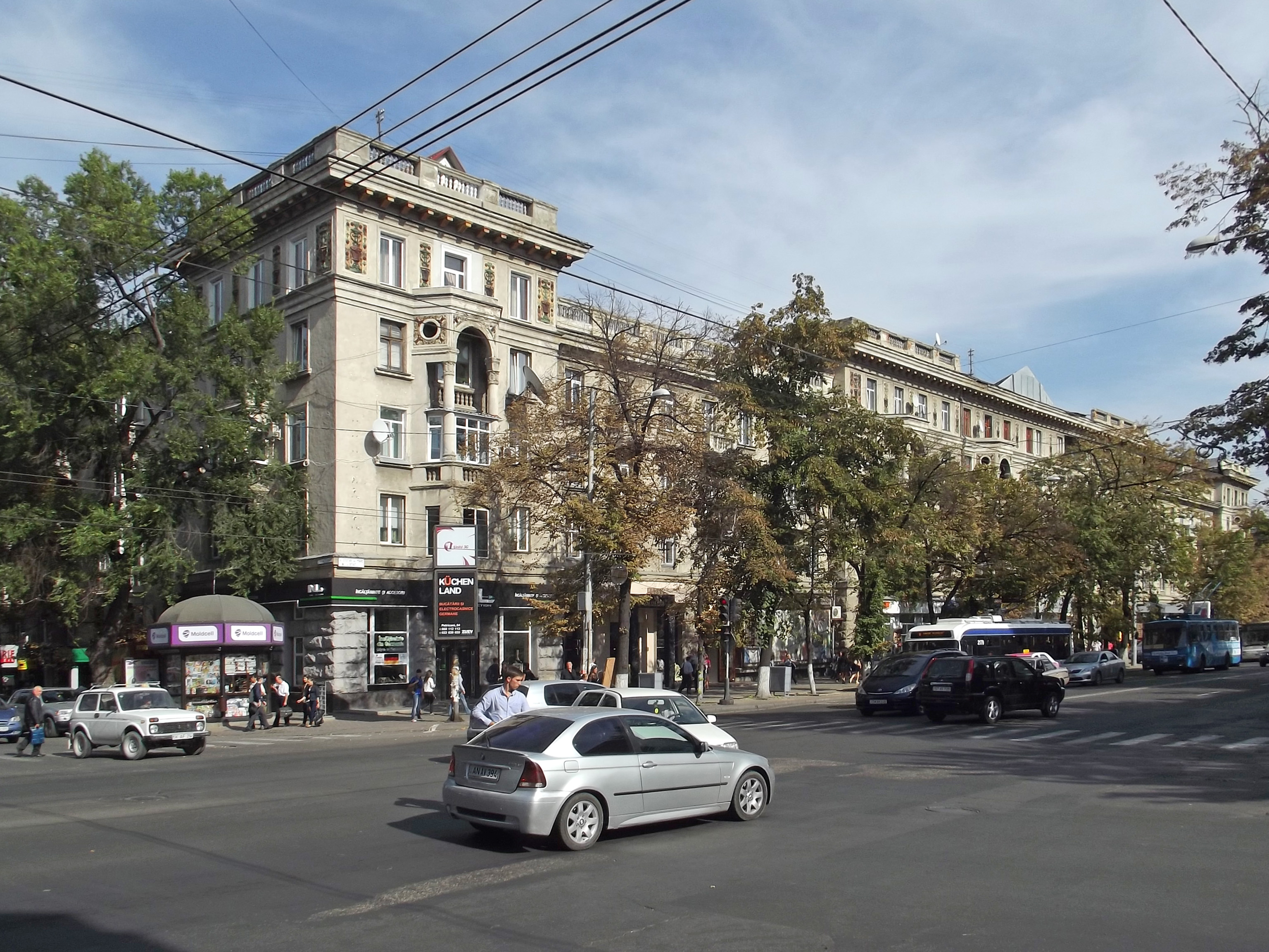 Застройка Штефан чел Маре